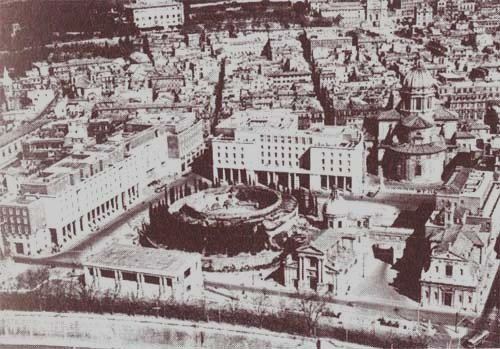 Sistemazione di Piazza Augusto Imperatore a Roma Foto non artistica con più di 20 anni Autore sconosciuto